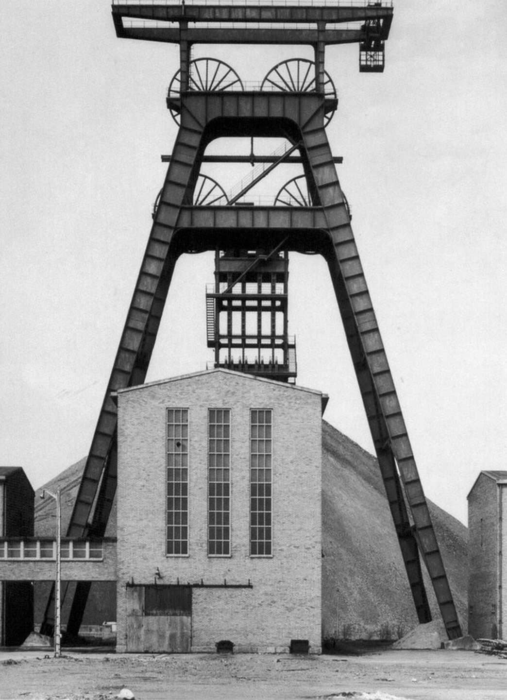 Chevalement double-compartimenté du puits n° 13-1 - 13-2 de la Fosse n° 13 - 13 bis du Groupe de Béthune, Sains-en-Gohelle, Pas-de-Calais, Nord-Pas-de-Calais, France.